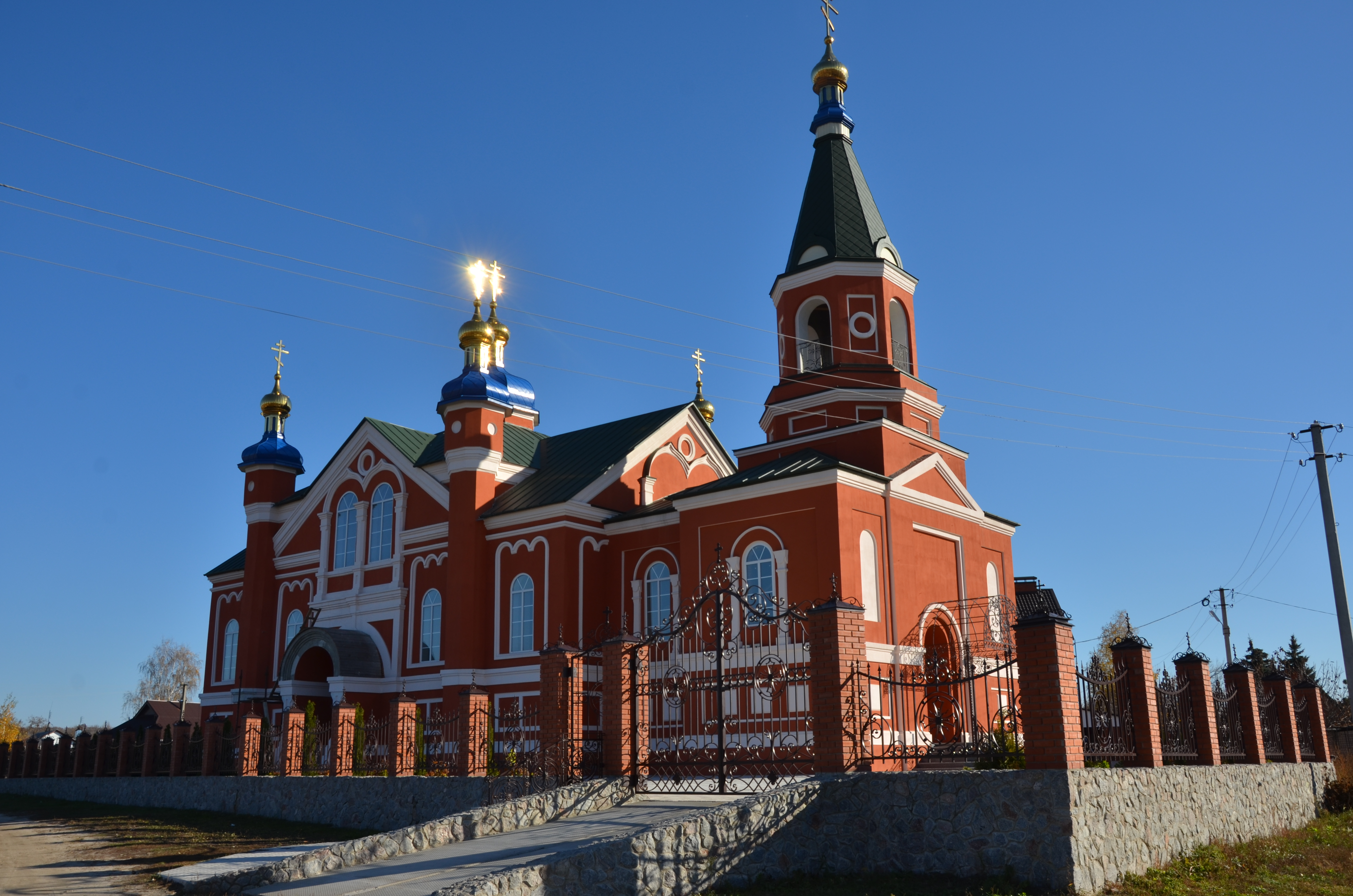 Тихоновська церква (діюча), Борщова